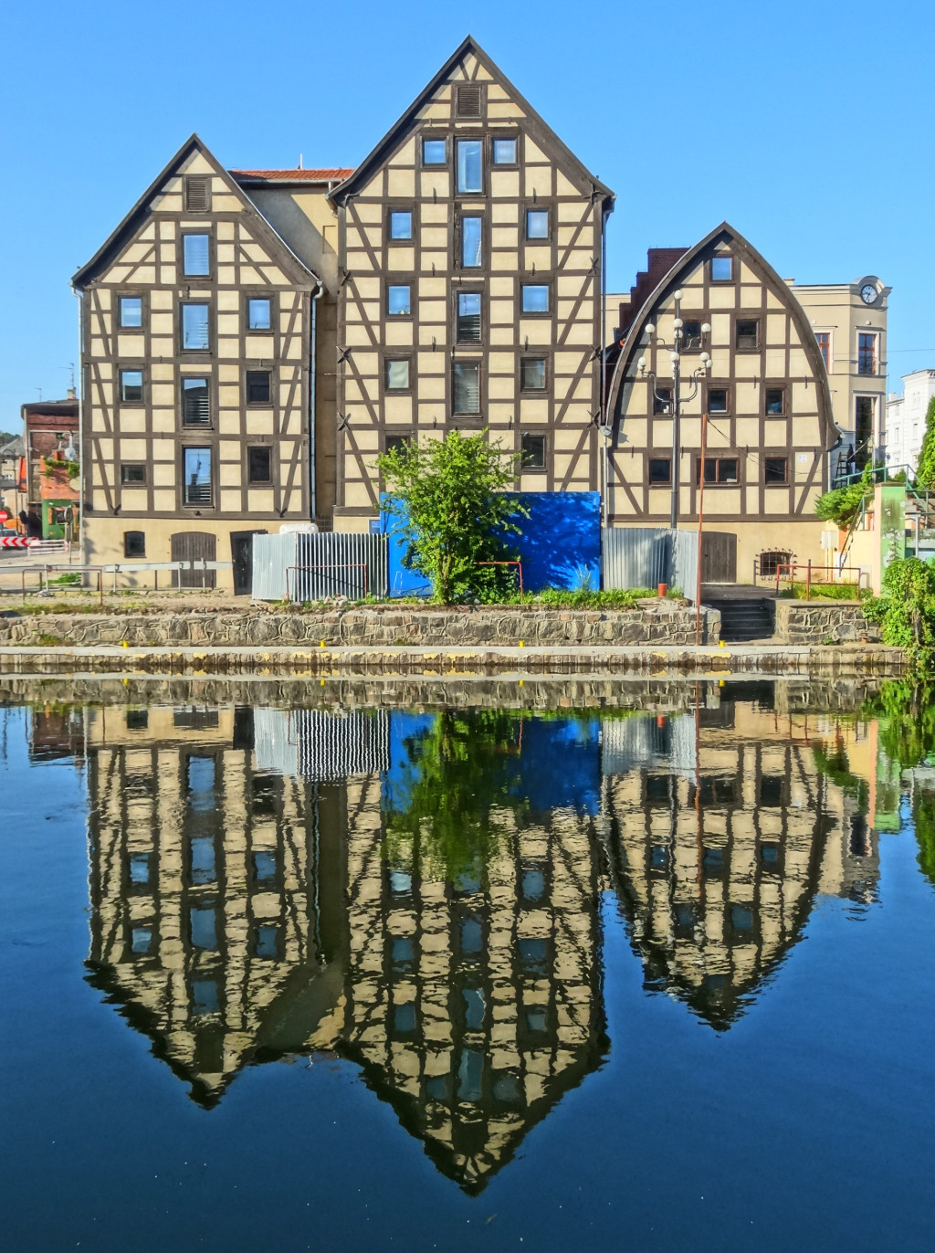 Spichrze nad Brdą w Bydgoszczy, zbud. w latach 1793-1800, od 1964 r. w gestii Muzeum Okręgowego